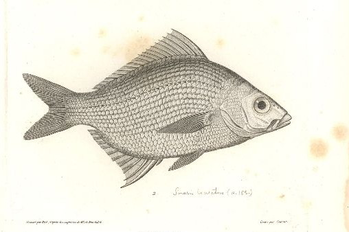 Smaris lineatus Humboldt, 1821 = Eugerres lineatus (Humboldt, 1821), Fam. Gerreidae, seitlich nach rechts; von Humboldt gesammelt und gezeichnet in Acapulco; Beschreibung von Humboldt S. 185, von Valanciennes S. 186-167.